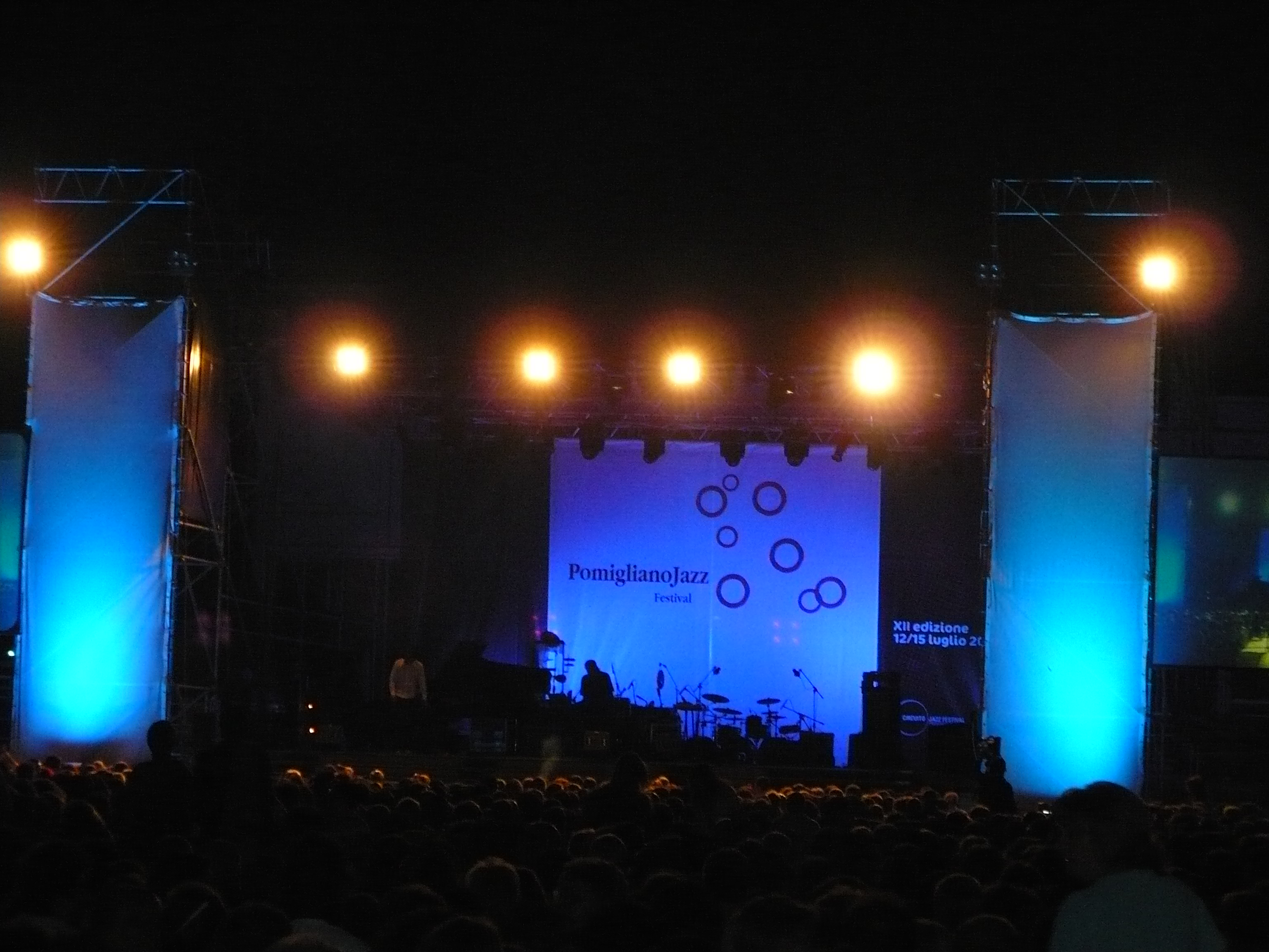 Palco dell'edizione 2007 del Pomigliano jazz festival, rassegna jazz che si tiene nel luglio di ogni anno a Pomigliano d'Arco, provincia di Napoli Autore foto: Roberto De Martino